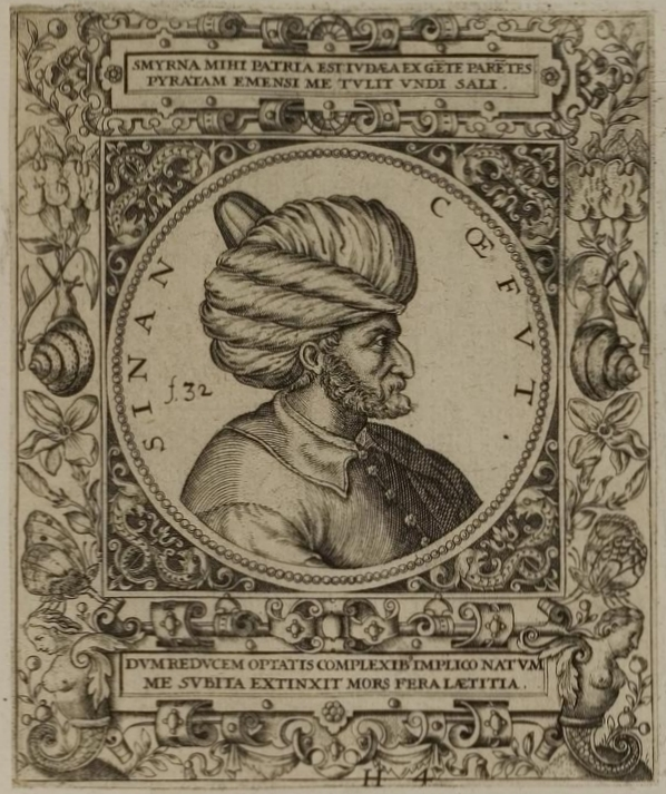 Grafik aus dem Klebeband Nr. 1 der Fürstlich Waldeckschen Hofbibliothek Arolsen Illustration aus: Georg Greblinger: Wahre Abbildungen der Türckischen Kayser vnd Persischen Fürsten / so wol auch anderer Helden und Heldinnen von dem Osman / biß auf den andern Mahomet. Johann Ammon, Frankfurt 1648 Motiv: "Sinan Coefut" (der Seeräuber Sinan Reis)